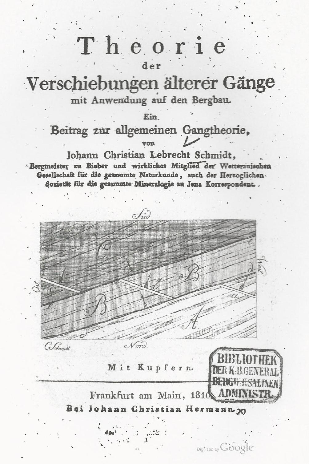 Titelbild "Theorie der Verschiebungen älterer Gänge" von Johann Christian Leberecht Schmidt